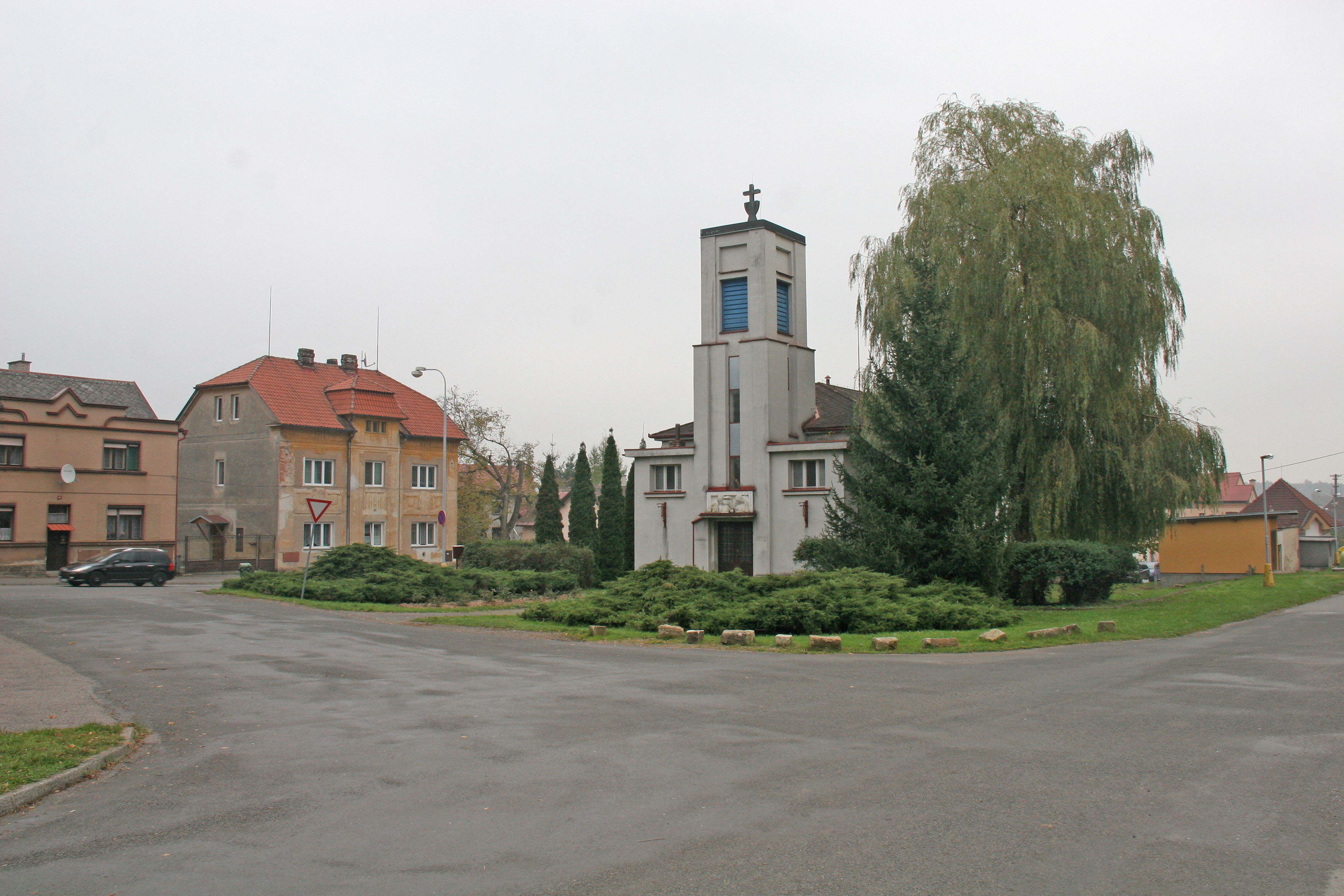 Bílá Třemešná - kostel církve čs.husitské